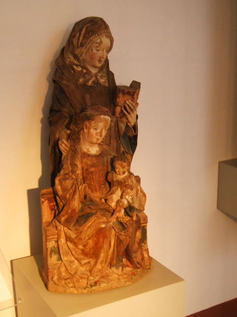 Das Foto zeigt Exponate im Kulturhistorischen Mseum in Stralsund in Stralsund im März 2007.